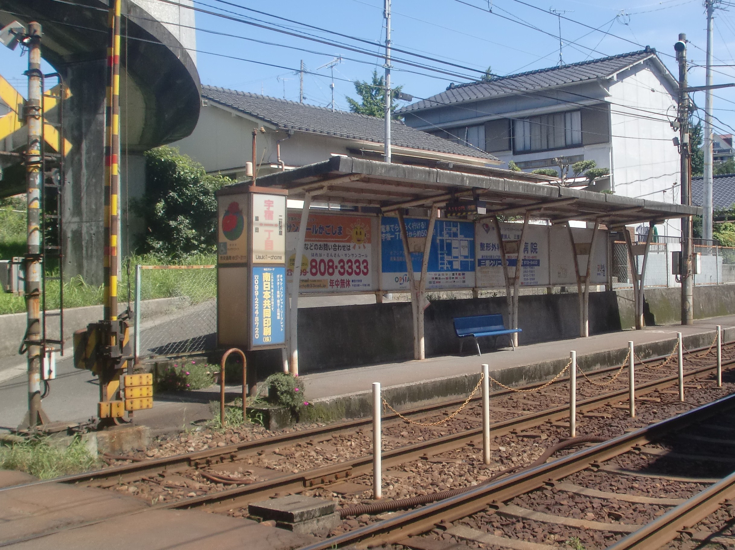 宇宿一丁目駅外観。